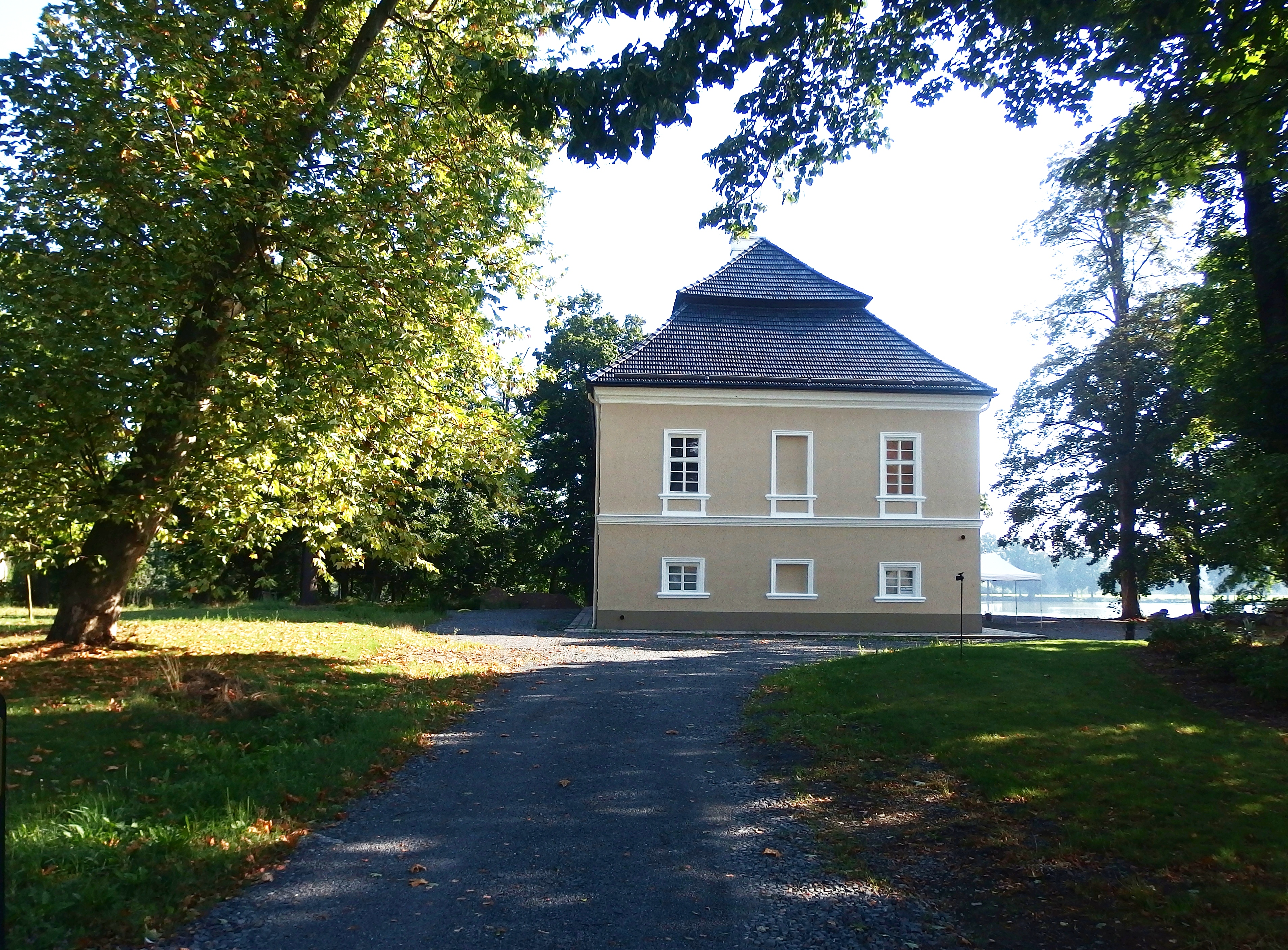 Zámek Jeseník nad Odrou, Jeseník nad Odrou 1, Jeseník nad Odrou.